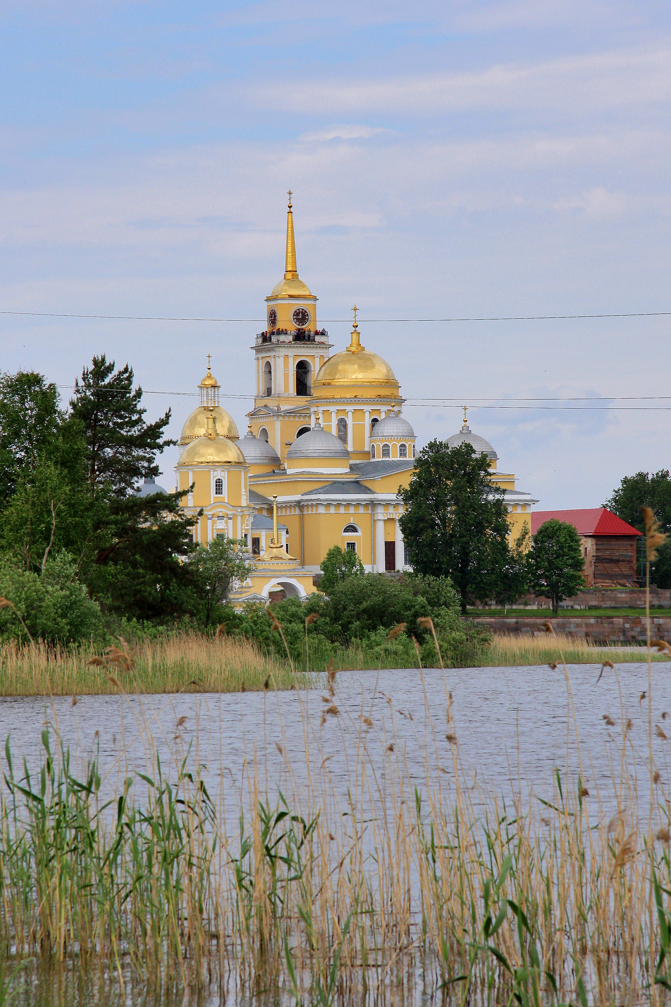 Собор Богоявленский (Тверская область, Осташков, оз. Селигер, остров Столбной)